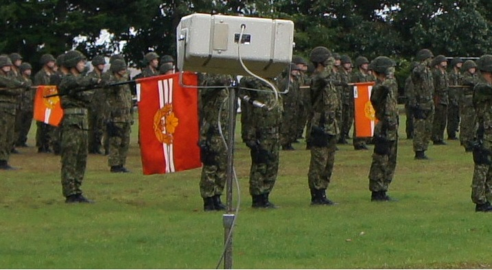 第1戦車群の群旗です。相当昔に撮影したネガからスキャンして作成しております。